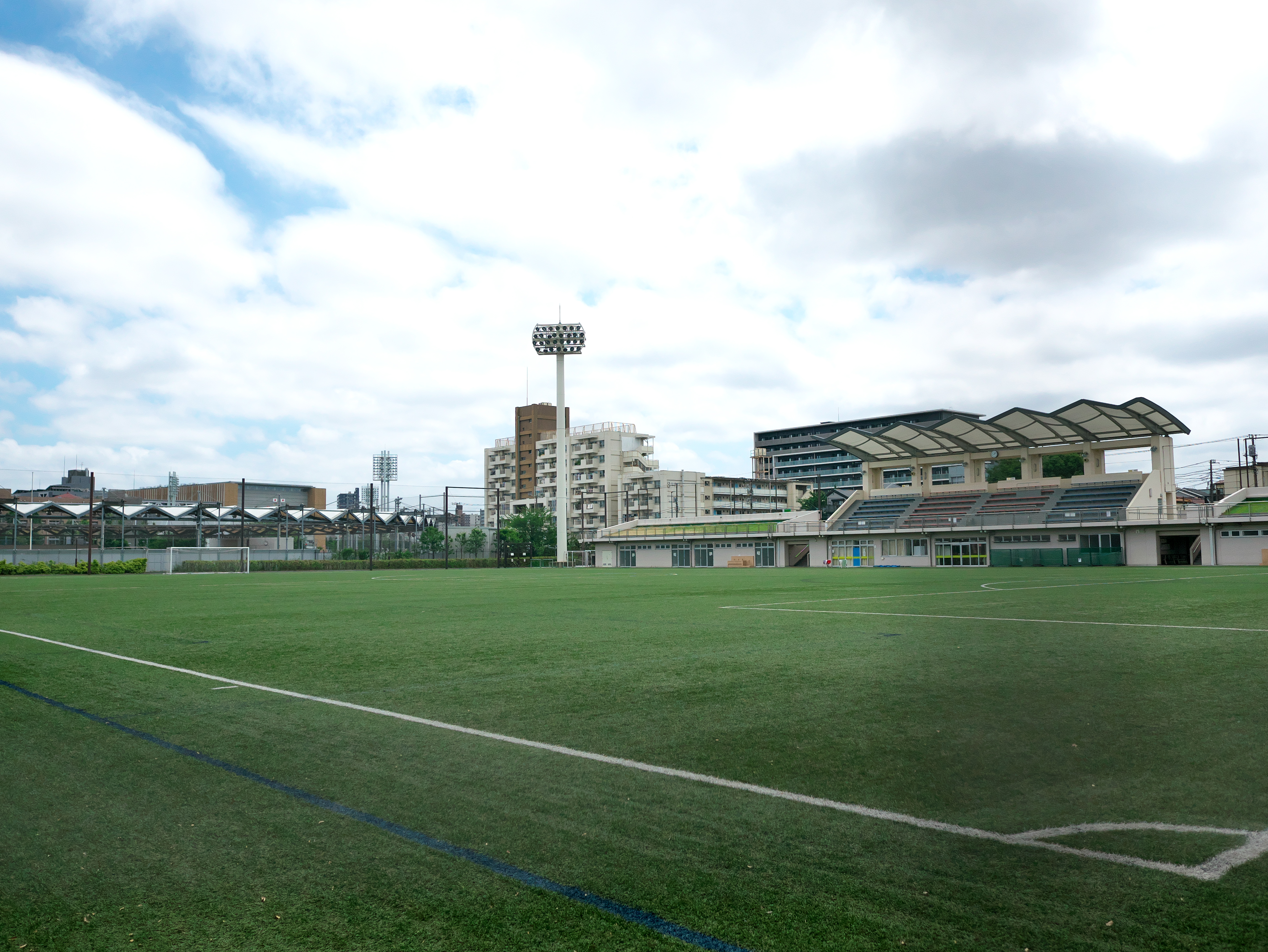 赤羽スポーツの森公園競技場の写真、公園から南西向き